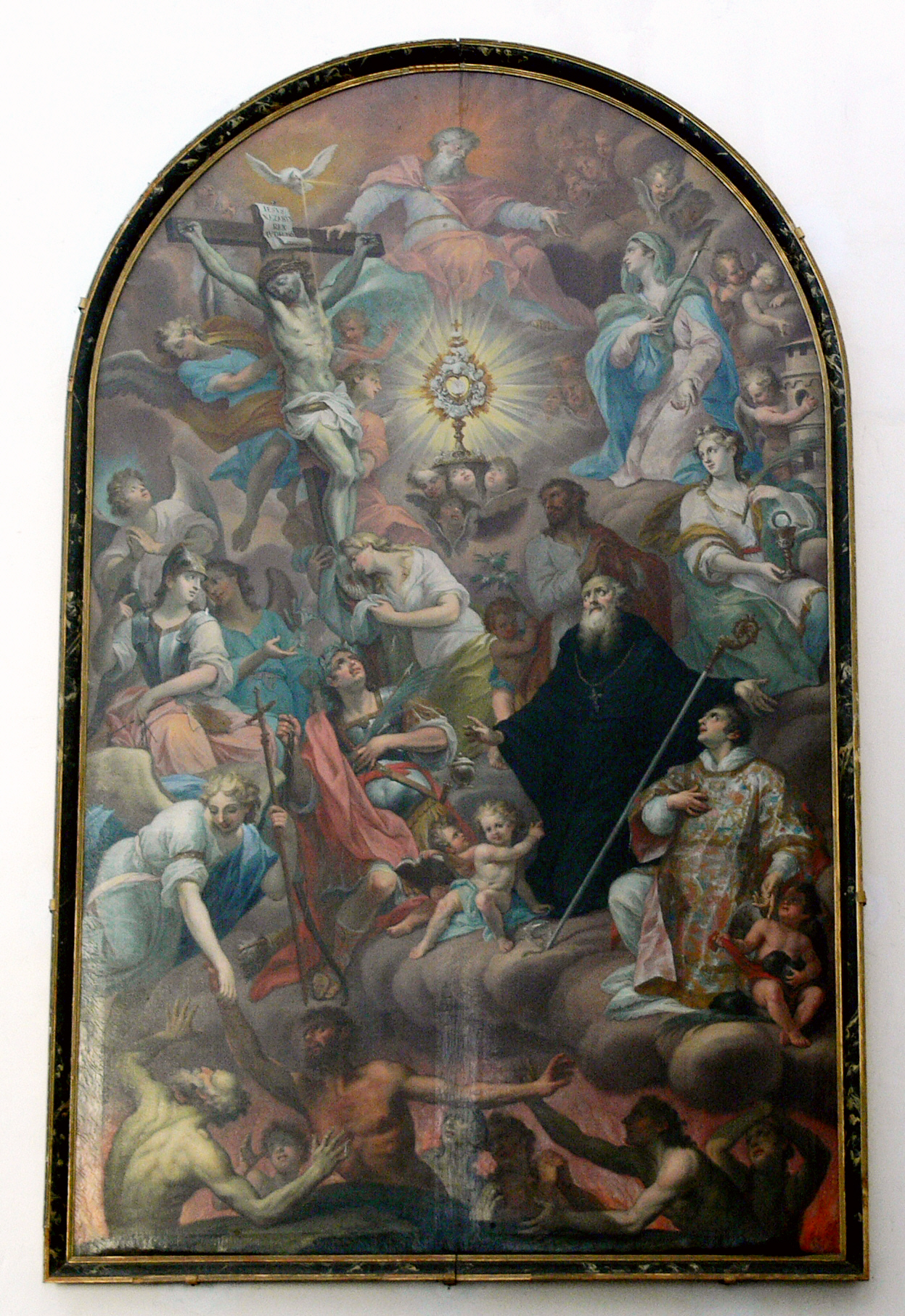 Kloster Heiligkreuztal Münster St. Anna Anton Mayer (Augsburg): Die sieben heiligen Zufluchten, 1715 Die Sieben Zufluchten sind die Dreifaltigkeit, der Gekreuzigte, die Eucharistie, die Muttergottes, die Erzengel, die Heiligen (hier die hl. Magdalena, Stephanus und Barbara) sowie die Armen Seelen.